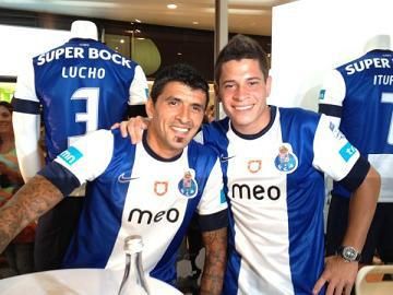 Iturbe (a droite) avec l'ex Marseillais Lucho Gonzaléz